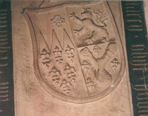 Wappen der Witwe Kunigundis, einer Urenkelin von Heinrich Beyer von Boppard und Lisa von Pyrmont (von Lösnich) von 1476 im Kreuzgang des ehemaligen Kosters Marienberg in Boppard